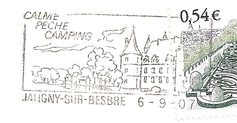 marque postale de Jaligny-sur-Besbre (France)